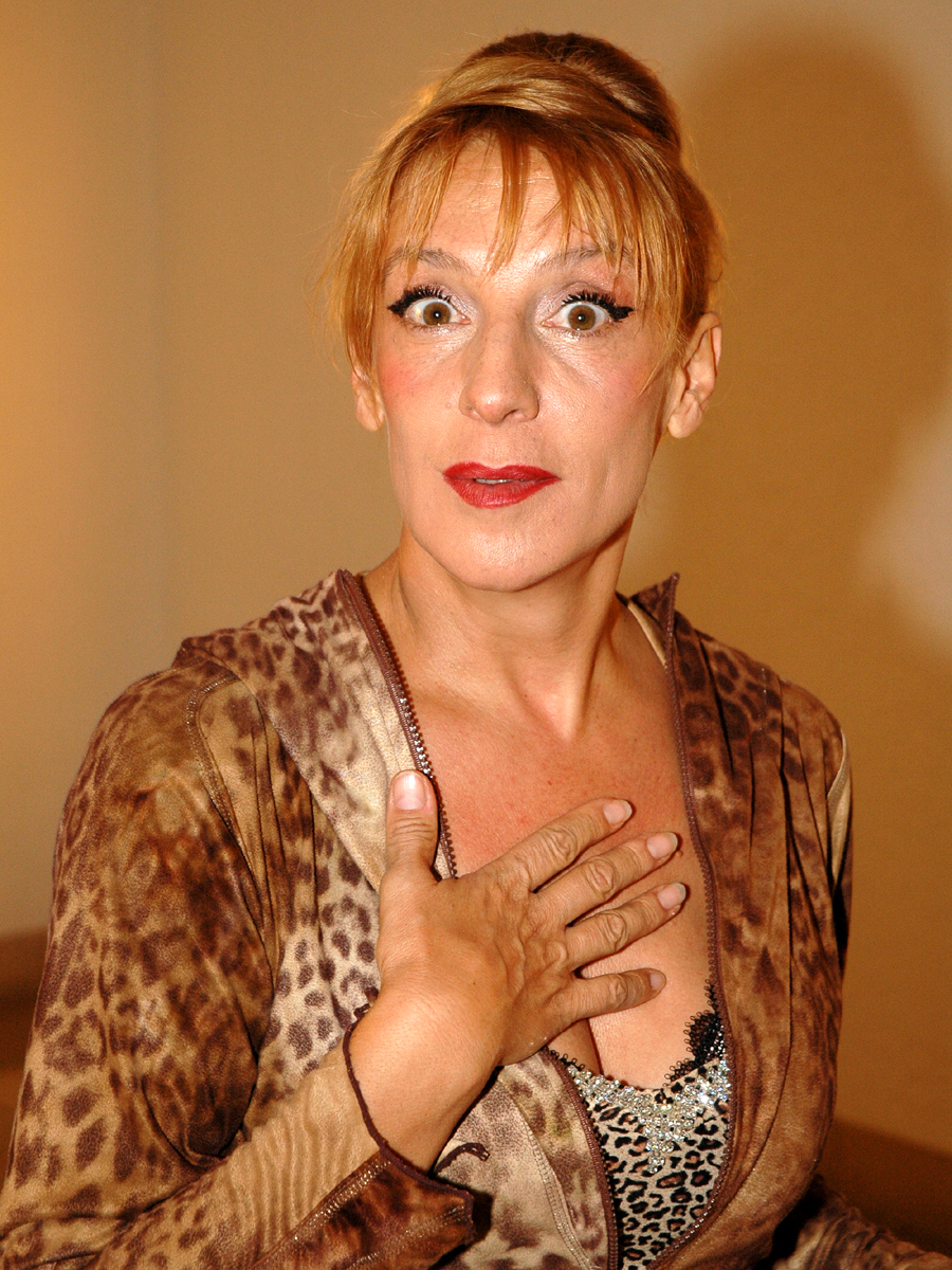 Sissi Perlinger bei einem Künstlerempfang im Alten Rathaus in München (2011)